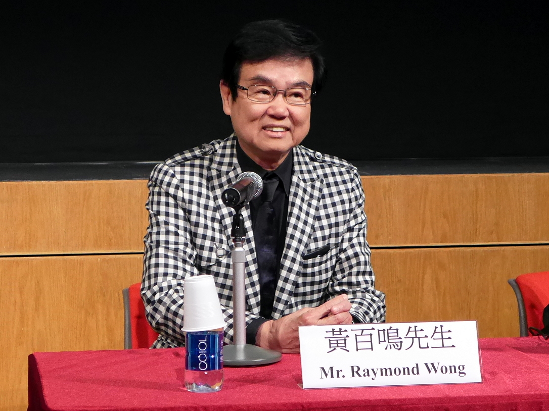 Raymond Wong Bak-ming